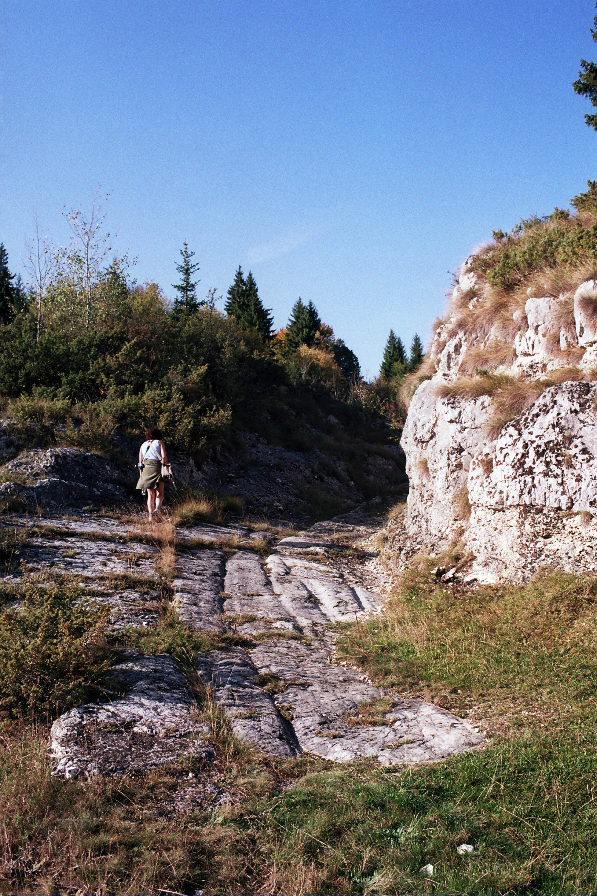 Aşezarea romană de la Podu Dâmboviţei: drumul roman